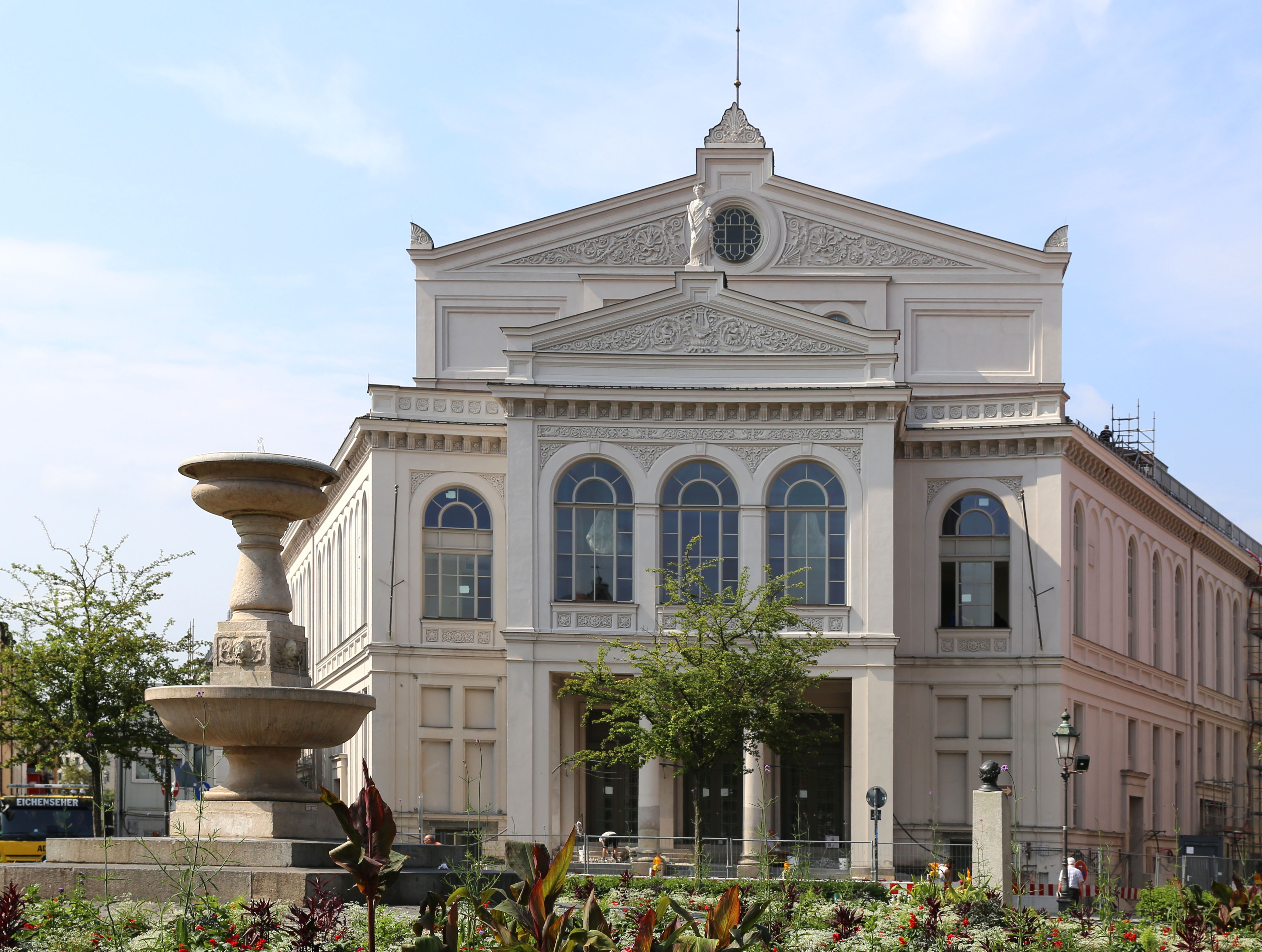 Gärtnerplatztheater, neu renoviert im Juni 2017, Totale mit Brunnen links seitlich im Vordergrund